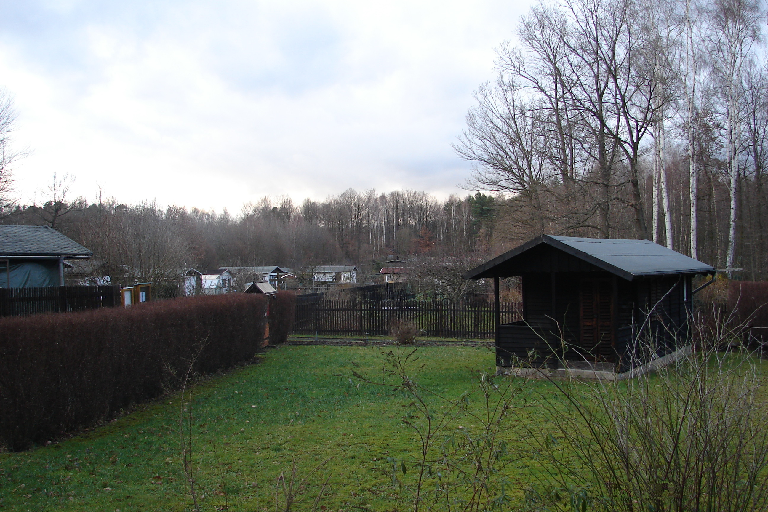 Bühlauer Waldgärten, rechts die Schölerlaube